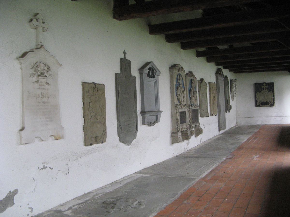 Begräbnishalle unter dem Organistenhaus bei der Stadtkirche Bremgarten